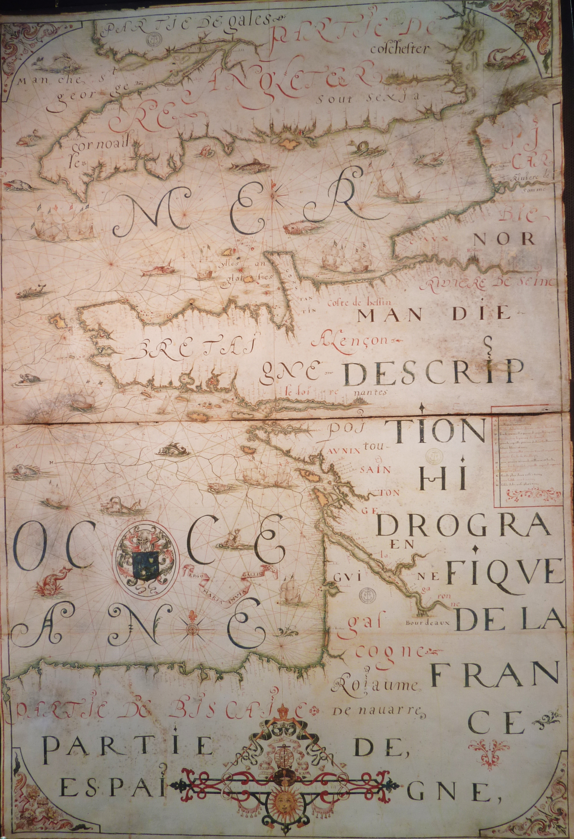 Portulan de Jean Guédard, pilote et hydrographe à Dieppe (1627). Il est chargé en 1627 de "décrire les côtes et hauteurs des îles de France" et publie un traité d'hydrographie en 1630. Ce portulan montre des lignes montrant sa perception des courants de fond ainsi que des sondes et des informations sur la nature des fonds (éléments rares à l'époque)